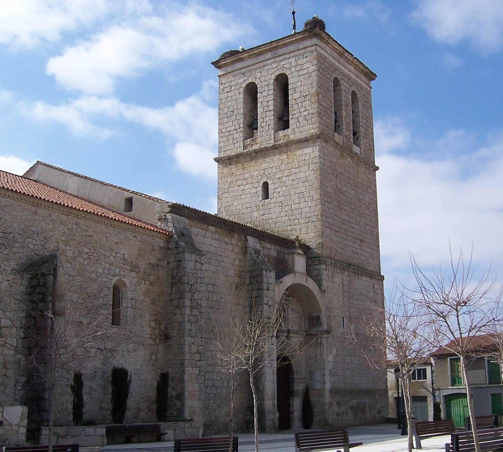 Iglesia de San Juan Bautista en la localidad de Arrabal de Portillo (Valladolid, España). Torre.